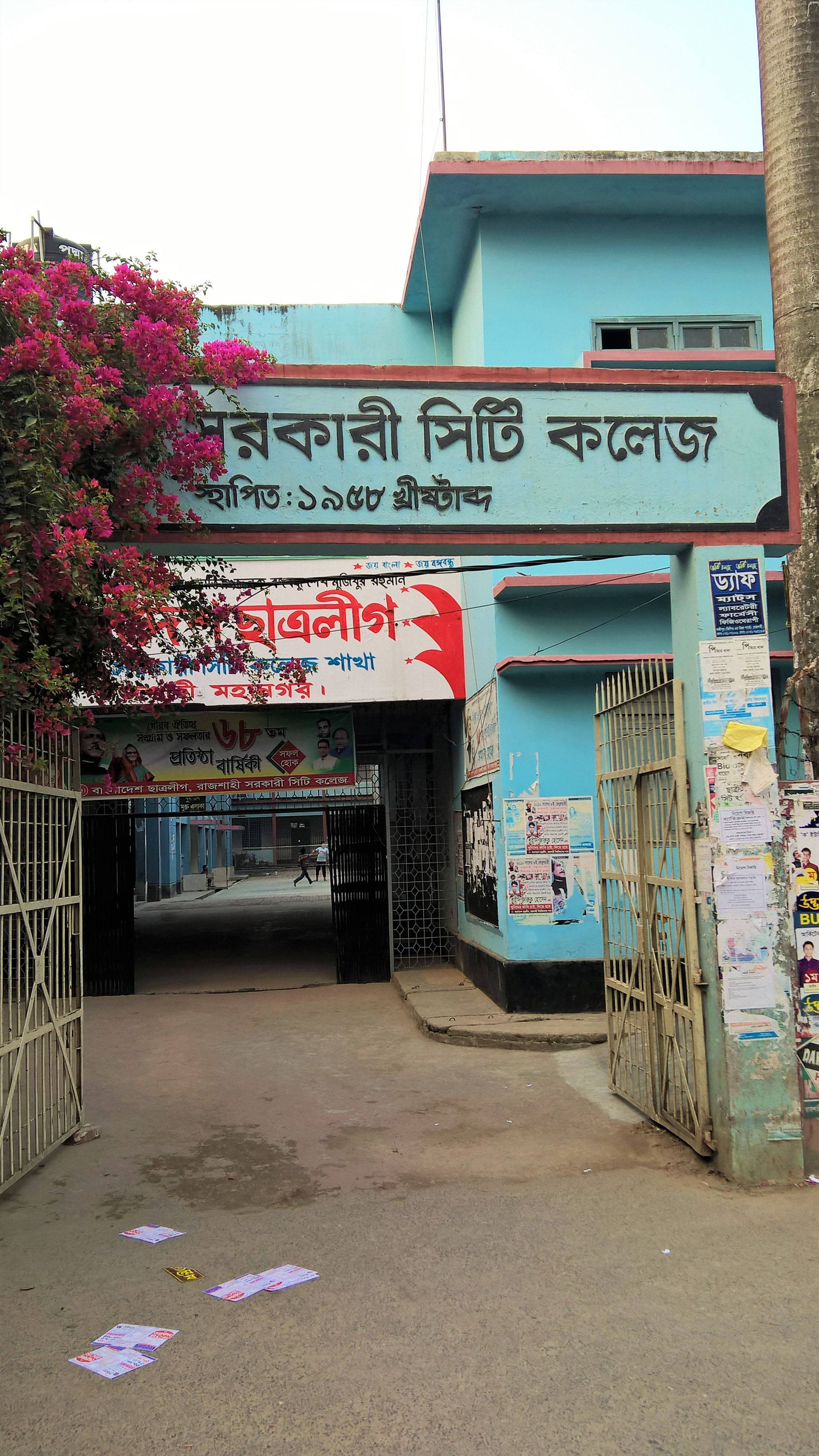 রাজশাহী সরকারি সিটি কলেজ রাজশাহী শহরের রাজারহাতা এলাকায় অবস্থিত একটি সরকারী কলেজ। এটি ১৯৫৮ সালে প্রতিষ্ঠিত হয় এবং জাতীয়করণ করা হয় ১৯৮২ সালে।